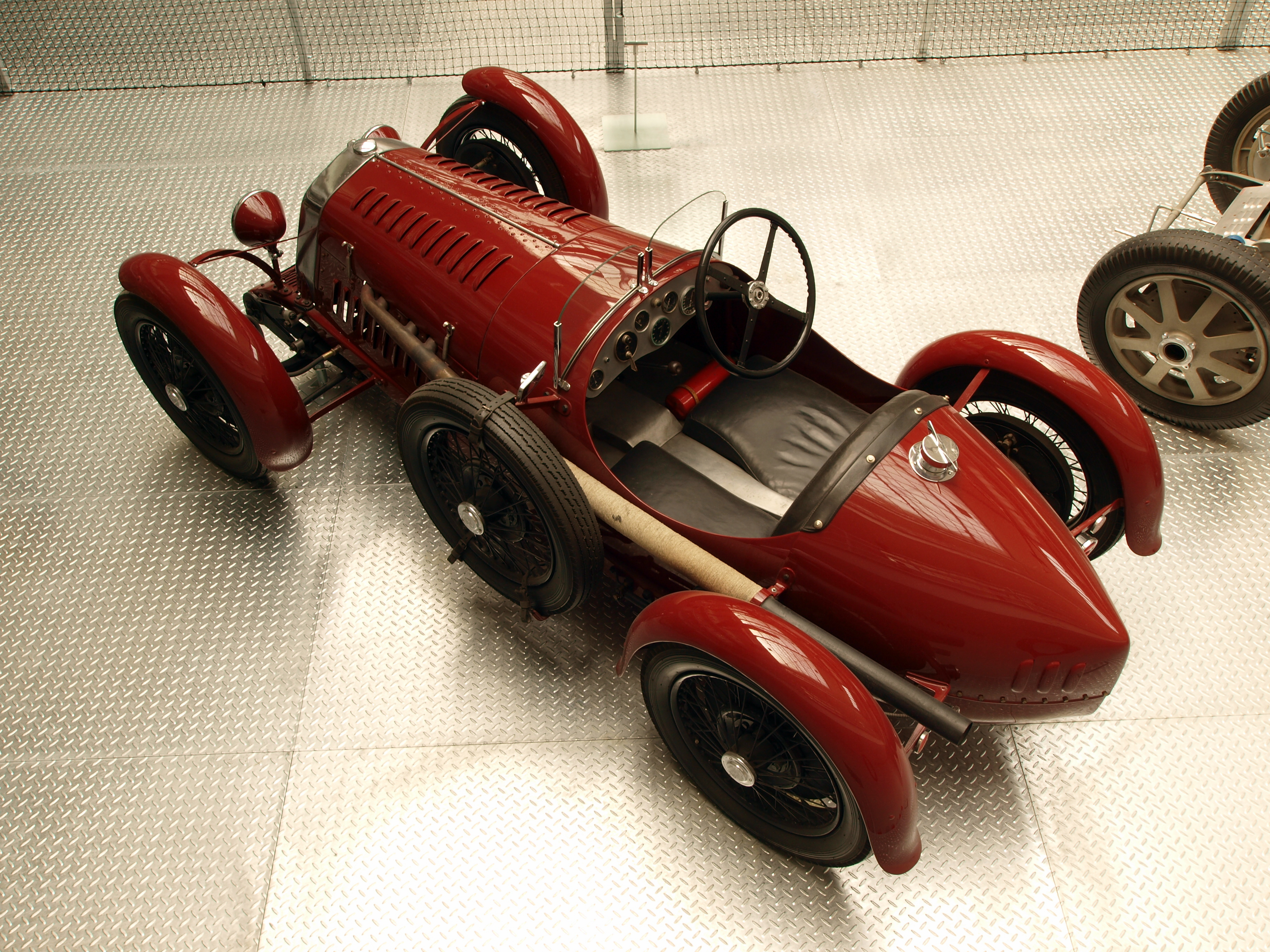 1929-1931 Wikov 7-28 Sport